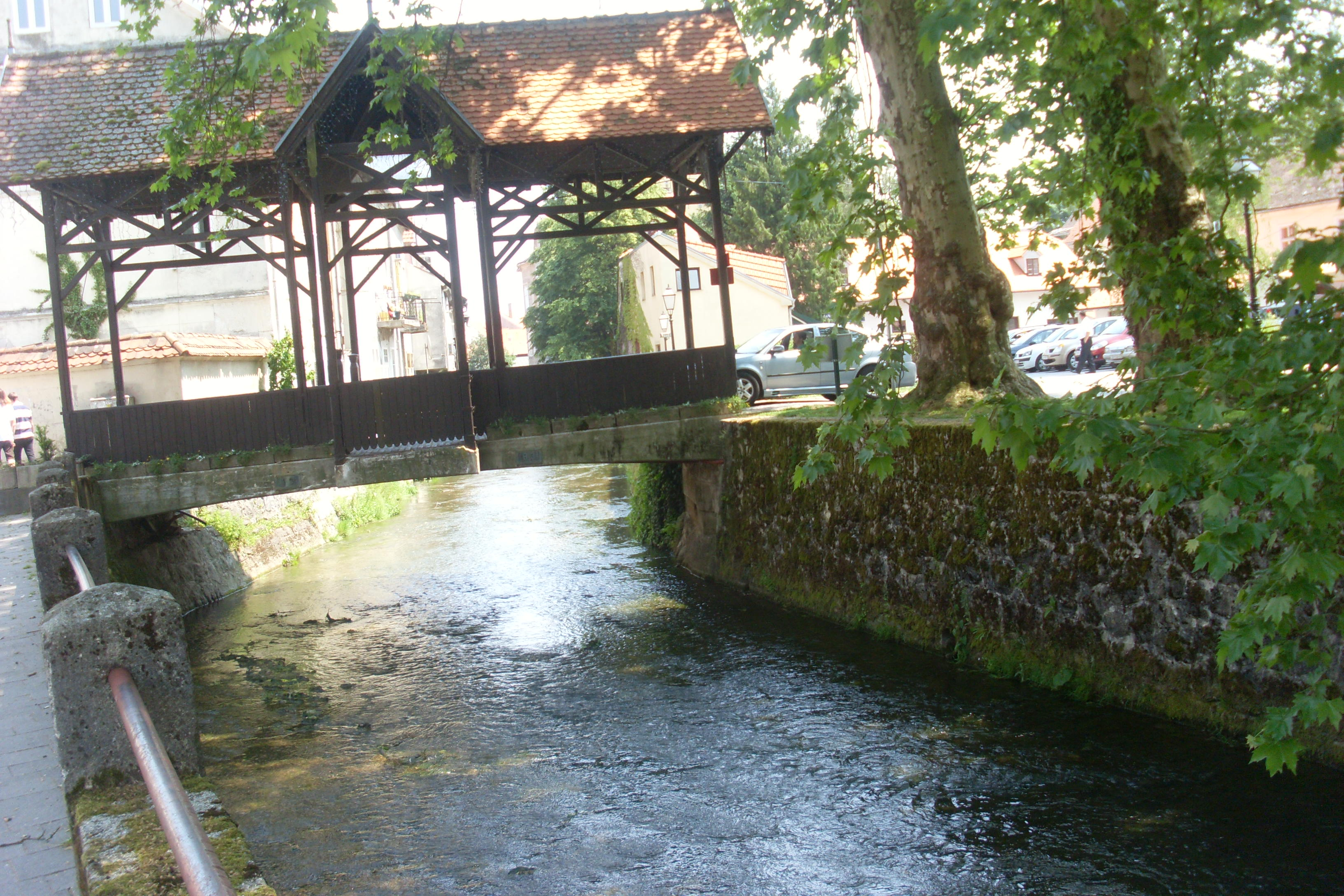 Samobor